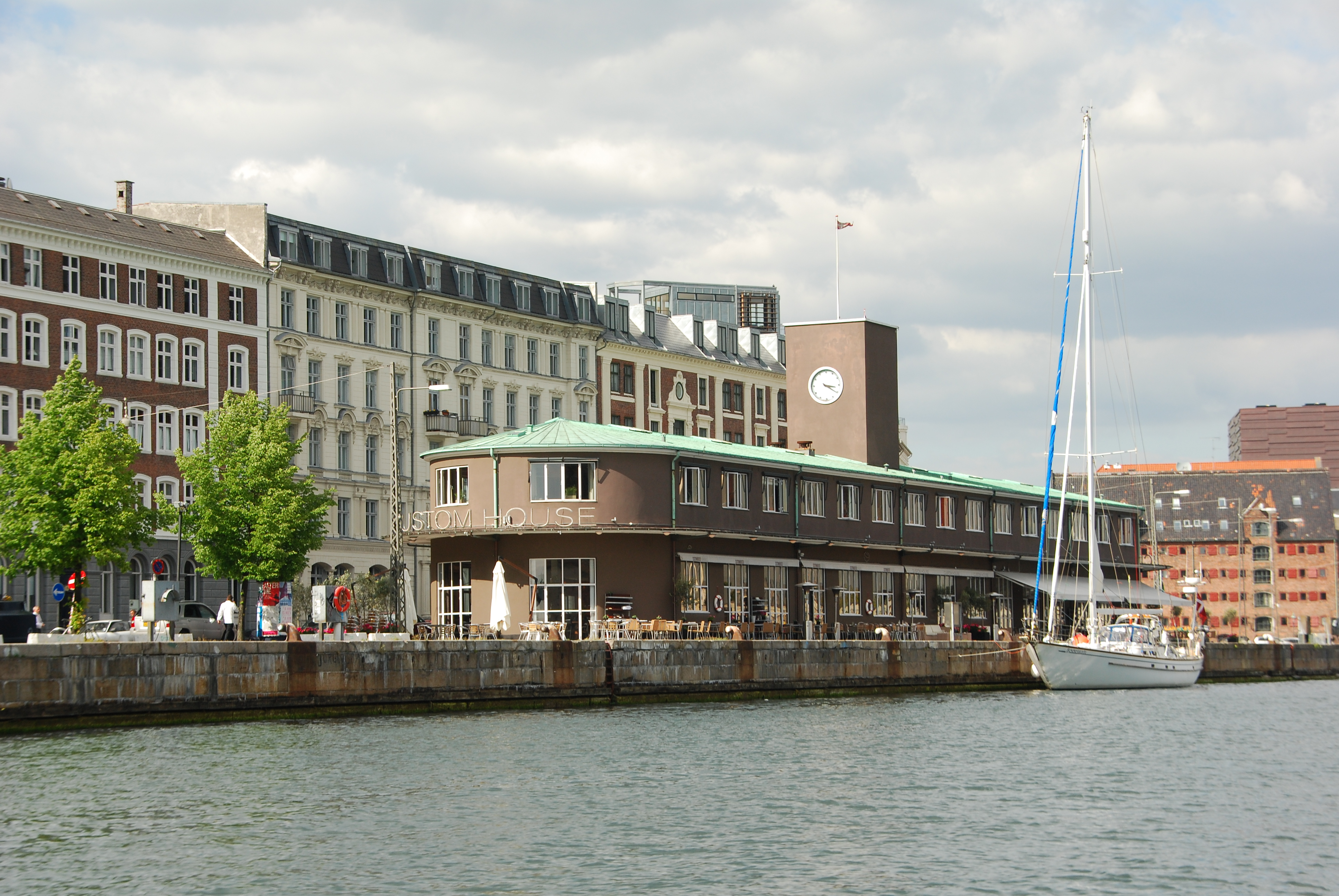 Custom House in Havnegade in Copenhagen, Denmark